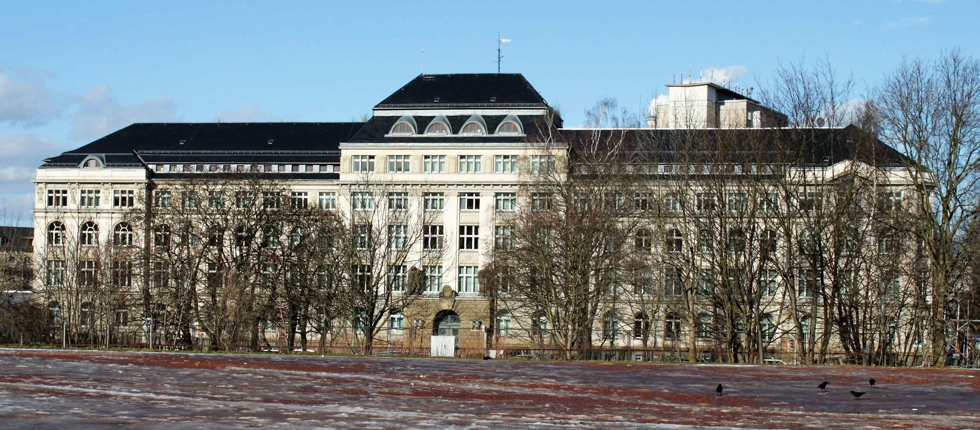 Polizeipräsidium Chemnitz in Sachsen, Deutschland.